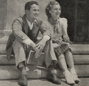 Brenda Joyce con il fidanzato e prossimo marito Owen Ward